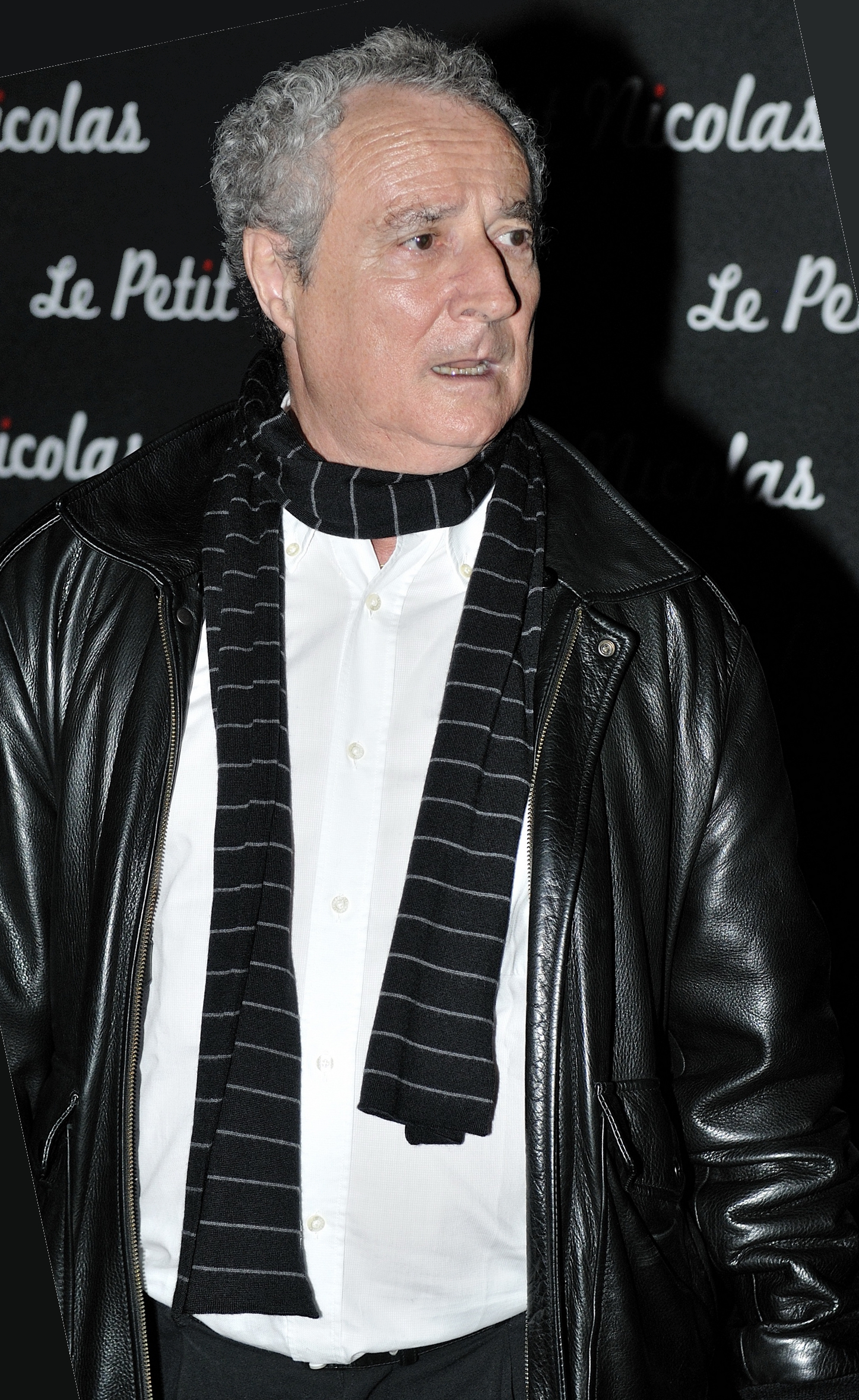 Avant Première du film Le petit Nicolas au Grand Rex, à Paris, le 20 Septembre 2009, en présence de toute l'équipe de film. Ici Daniel Prévost.